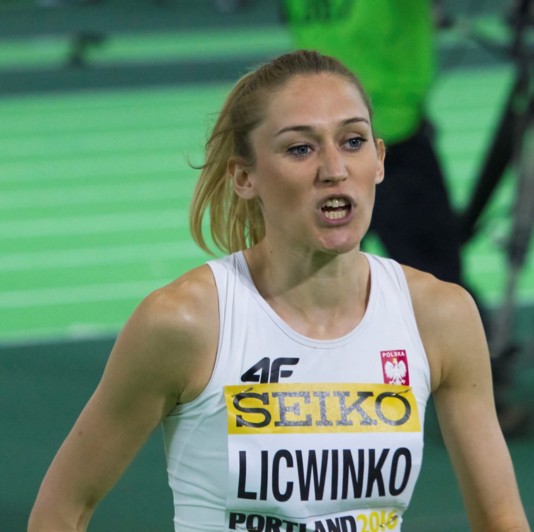 5087 licwinko